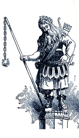 Магог